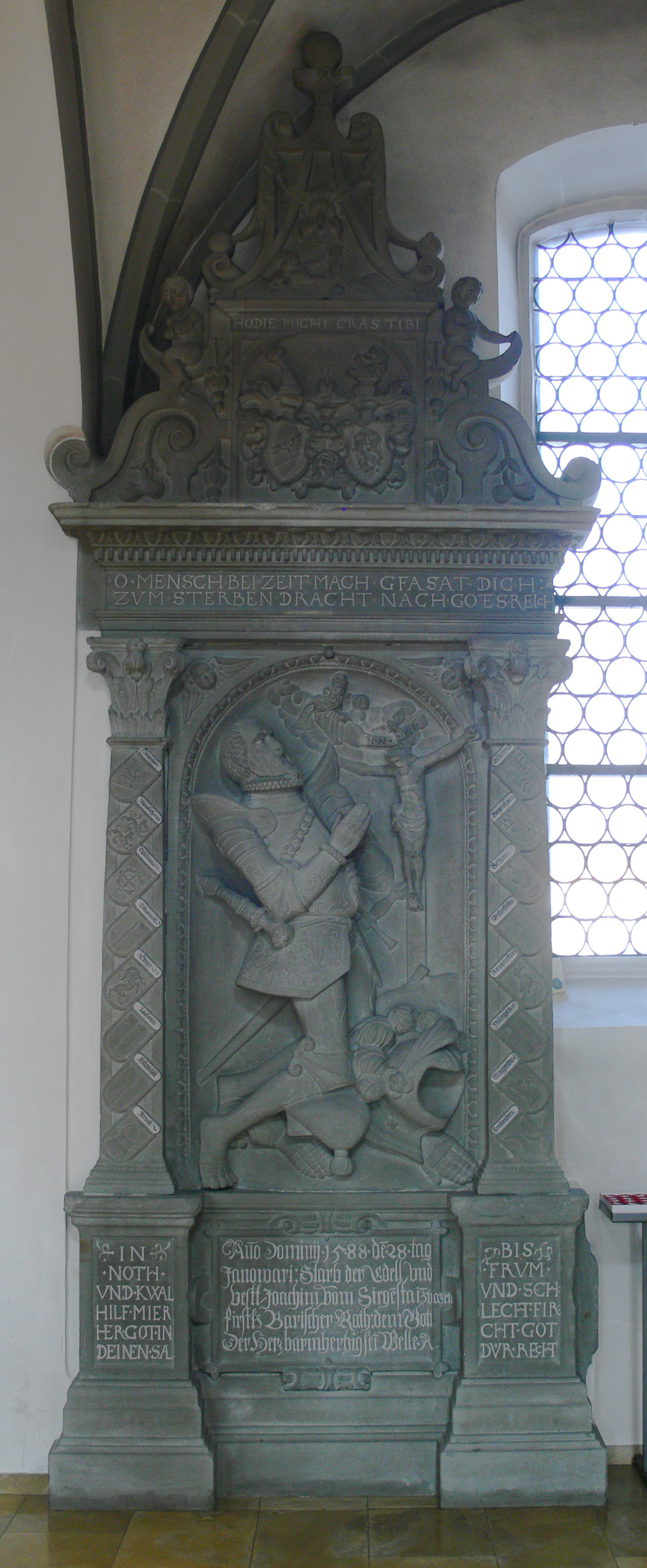 Epitaph des Joachim von Sirgenstein († 1588), Pfarrkirche St. Johannes Evangelist, Amtzell, Landkreis Ravensburg Gesamtansicht